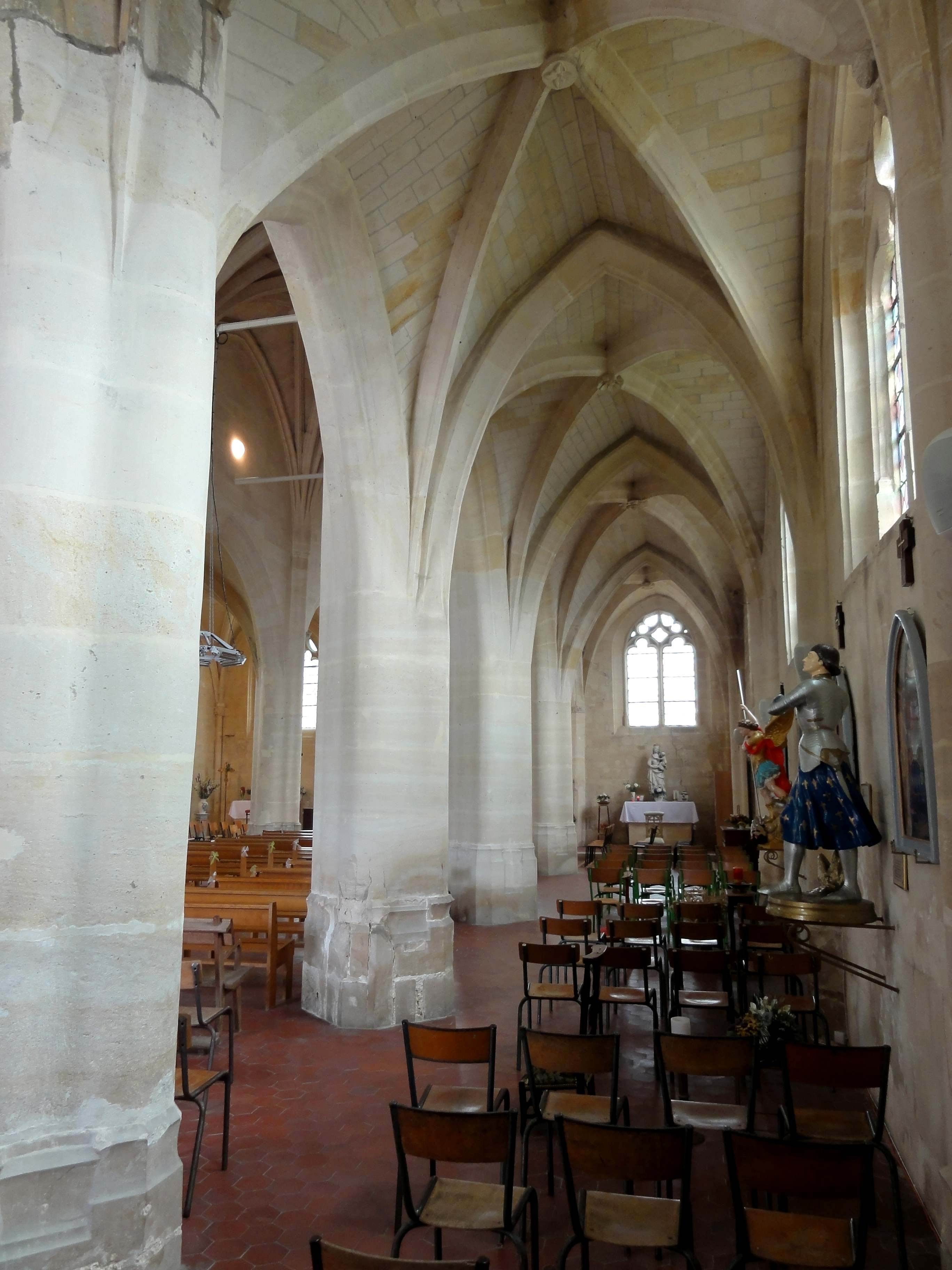 Intérieur de l'église - voir titre.